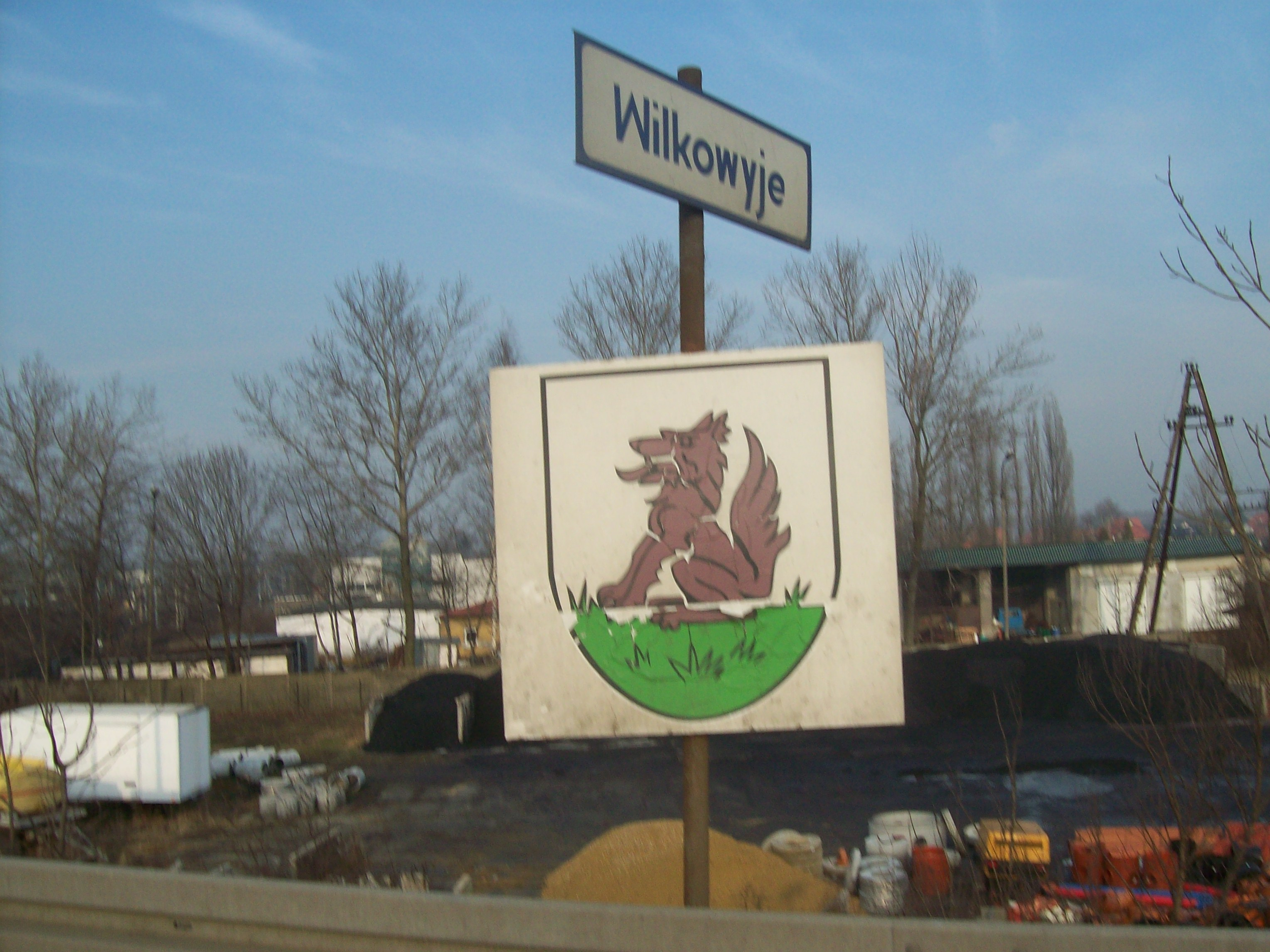 Herb Wilkowyjów - dzielnicy Tych